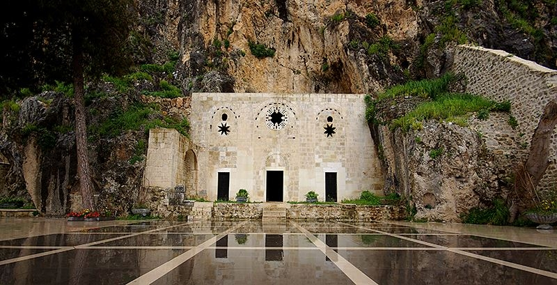 St. Pierre Kilisesi, tarihi milattan sonra ilk yüzyıllara kadar dayanan bir kilisedir. Hristiyanlara bu ad ilk kez burada verilmiştir. Dünyanın en eski mağara kilisesi olup aynı zamanda bir hac merkezi ilan edilmiştir.